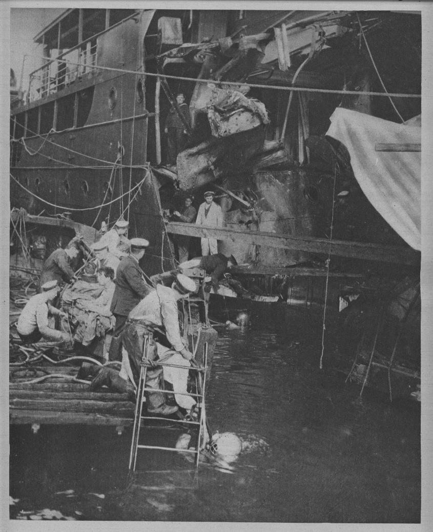 En rade de Salonique, réparation d'un navire endommagé, au premier plan un plogeur en scaphandre.